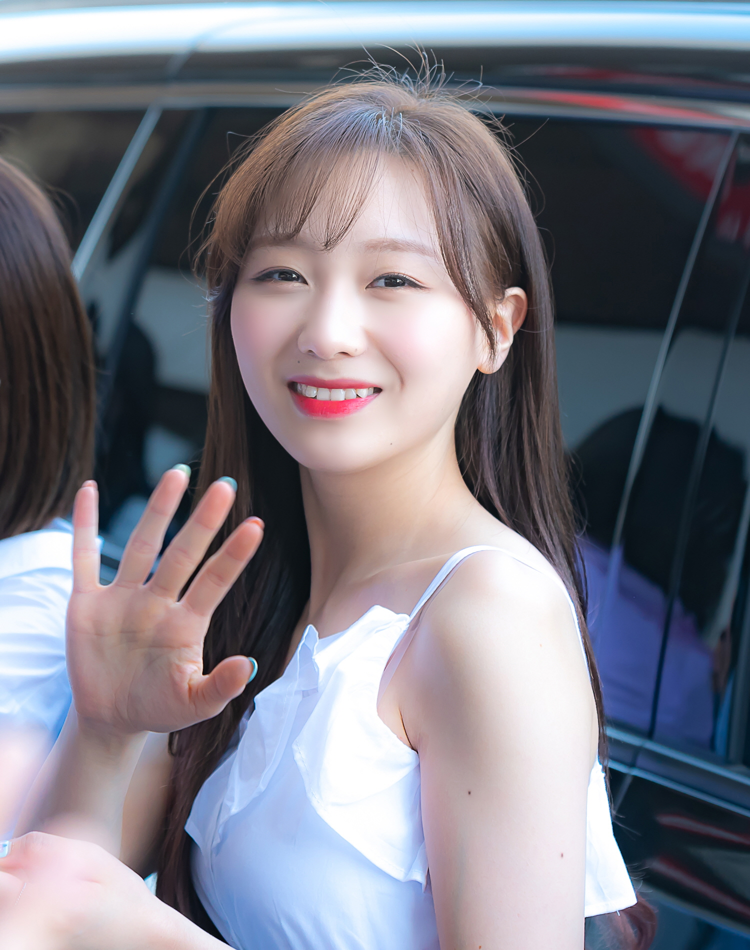 180601 김포공항 출국 - 케이, 수정, 지애